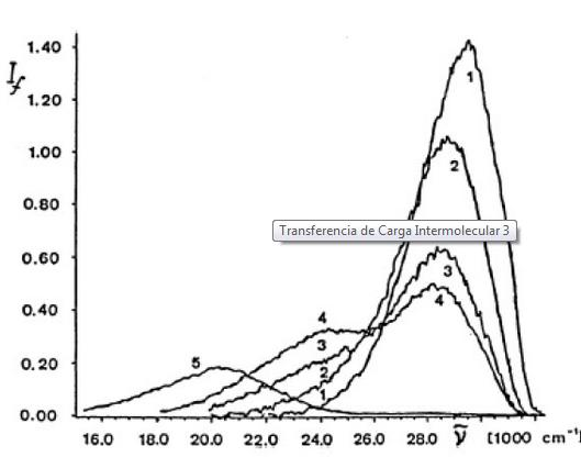 Efecte del dissolvent a l'ICT del DMABN